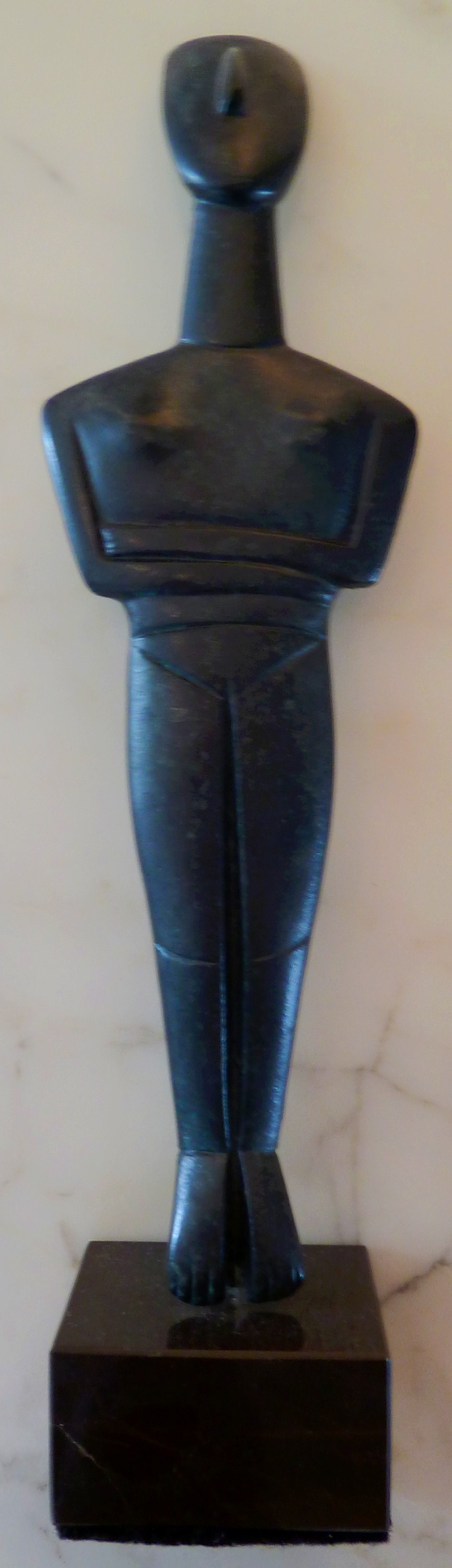 Der Fernsehschachpreis des Westdeutschen Rundfunks ab 2002, ein "Kykladenidol". In der Zeit der Kykladen, etwa 3500 v. Chr., wurde das Schachspiel in Persien erfunden. Das Original vorliegender Replik ist etwa 3000 Jahre alt und steht in Athen.